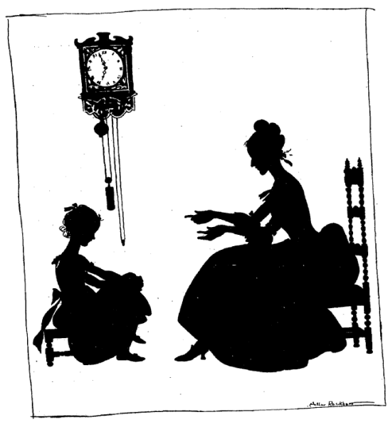 Lise et sa maman, Cendrillon par Arthur Rackham, 1919